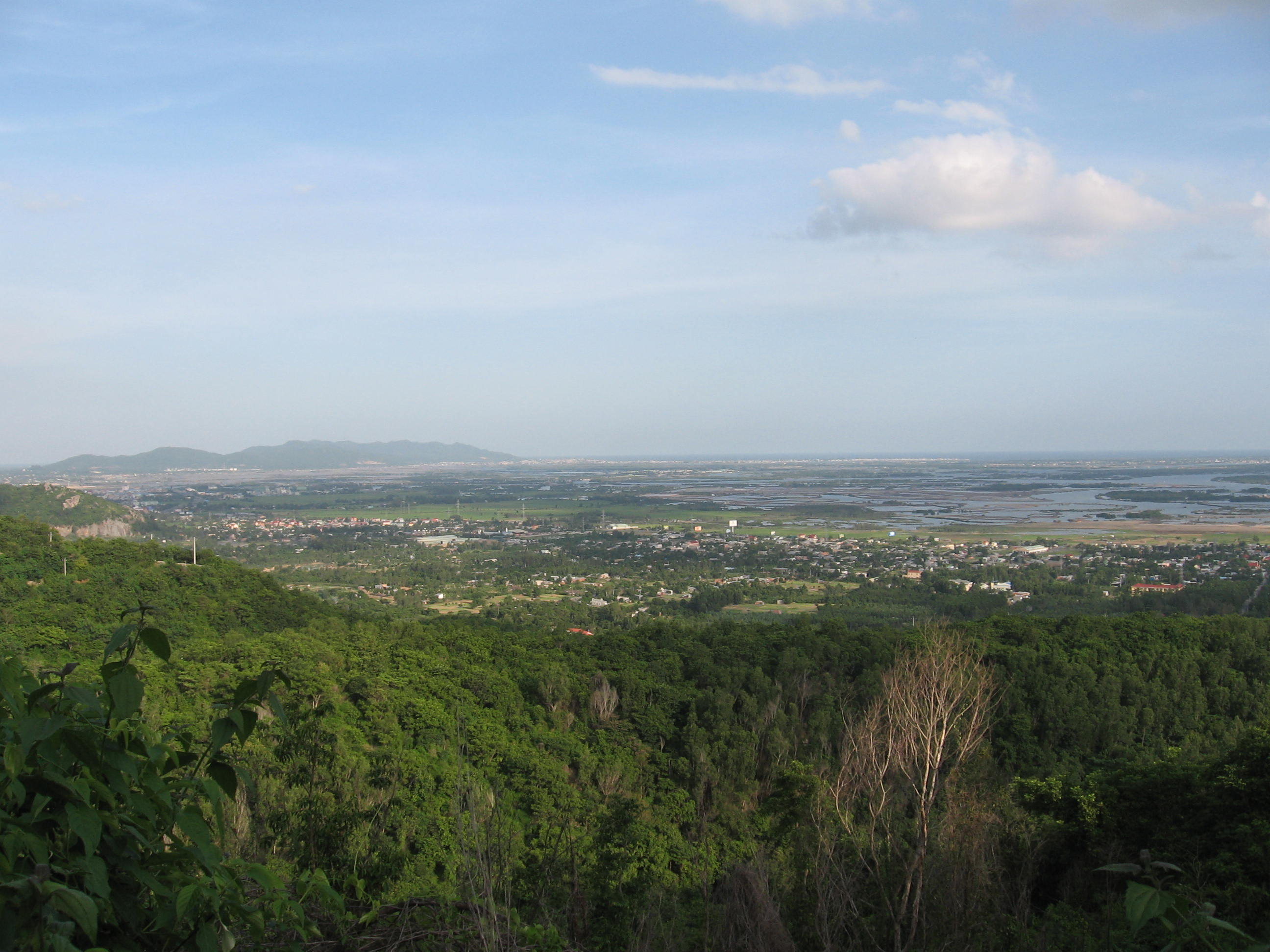 bà rịa